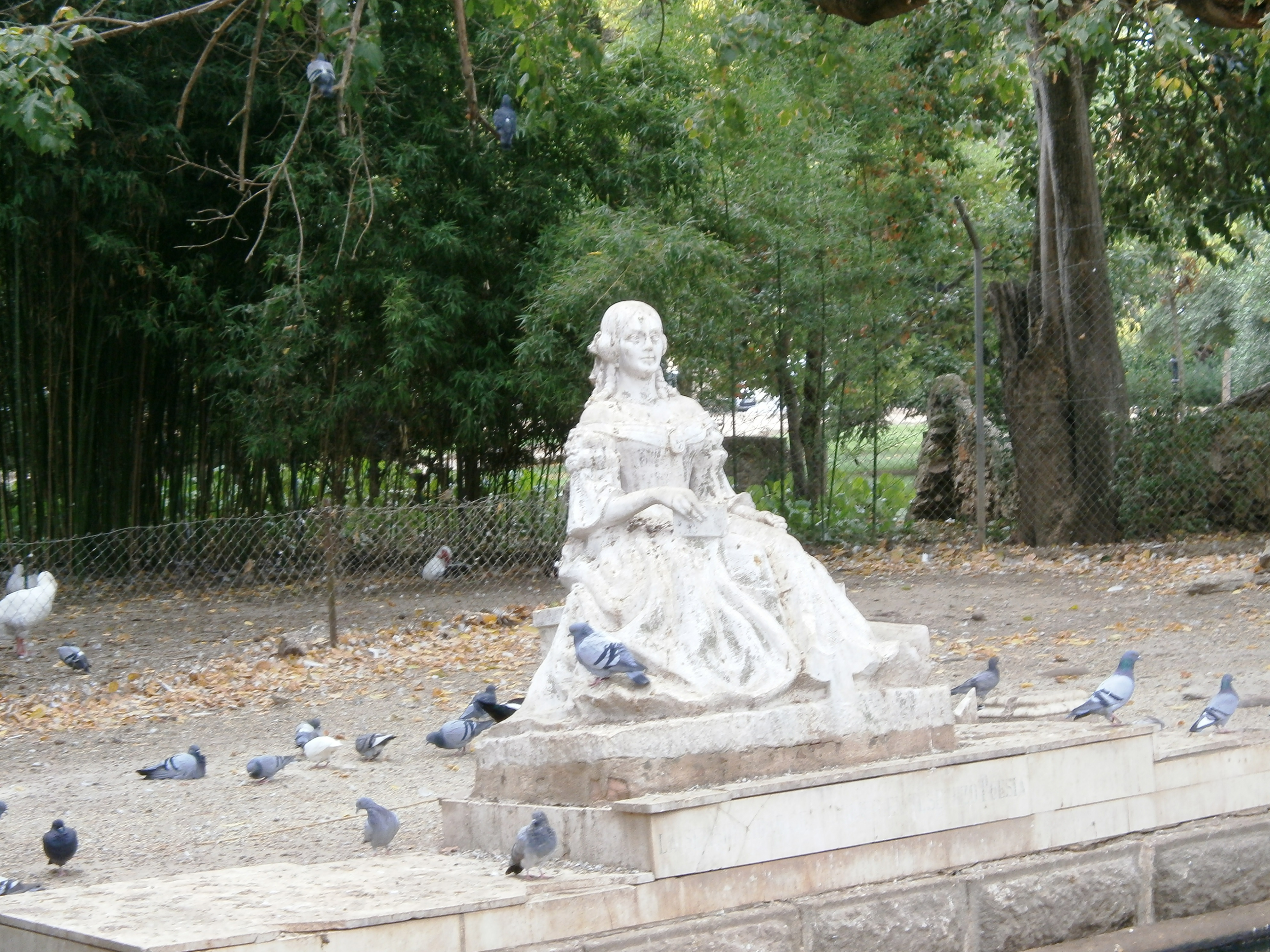 Estatua de la poetisa extremeña Carolina Coronado en el Parque de Castelar de Badajoz.